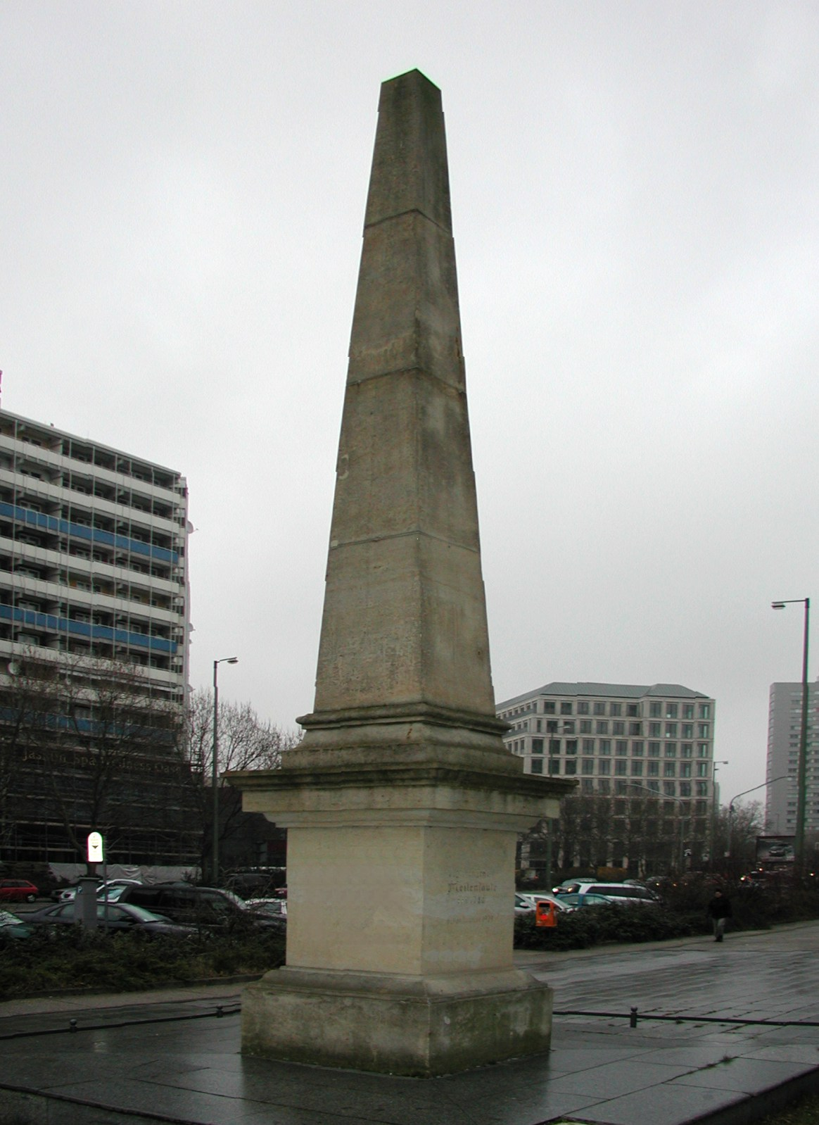 Die rekonstruierte Meilensäule auf dem Dönhoffplatz. Das Original stand am alten Leipziger Tor, etwa Niederwallstr. Ecke Alte Leipziger Str. (52.512246°N, 13.399320°E)